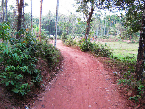 Muyyam, Taliparamba, India.